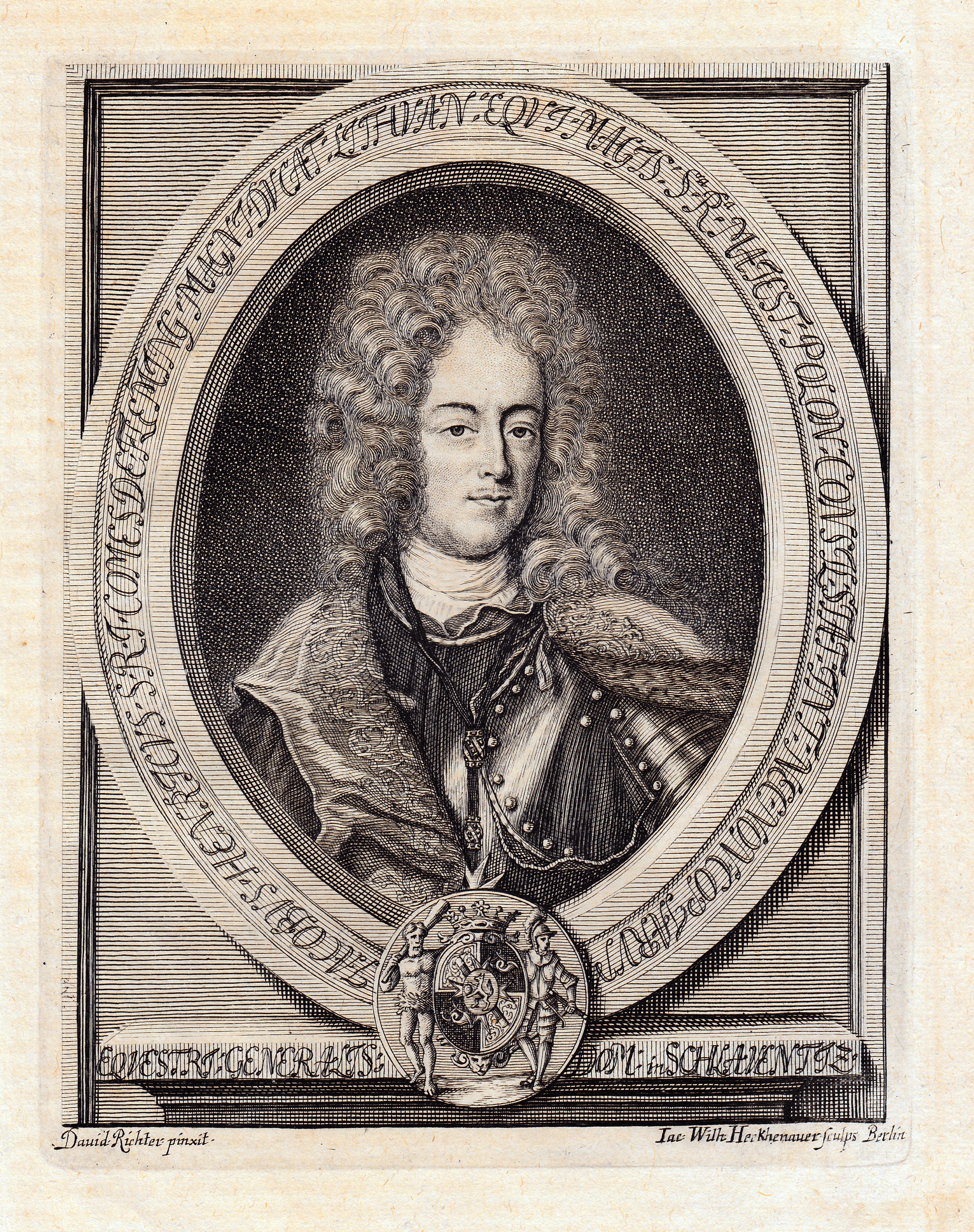 Беларуская (тарашкевіца): Партрэт Якуба Генрыка Флемінга (Jakub Henryk Fleming)